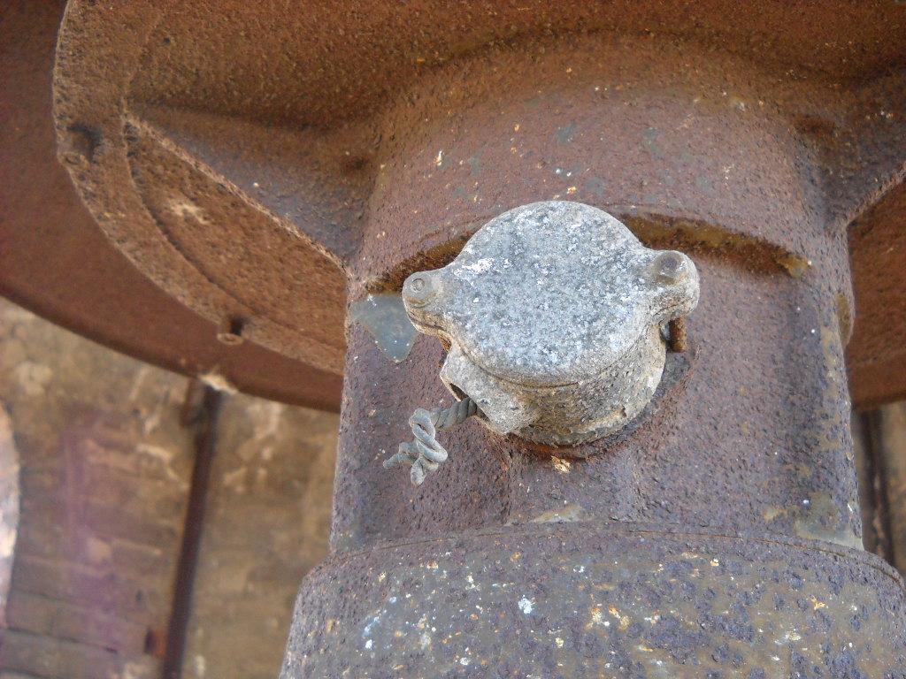 L'innesto del cavo di alimentazione della sirena